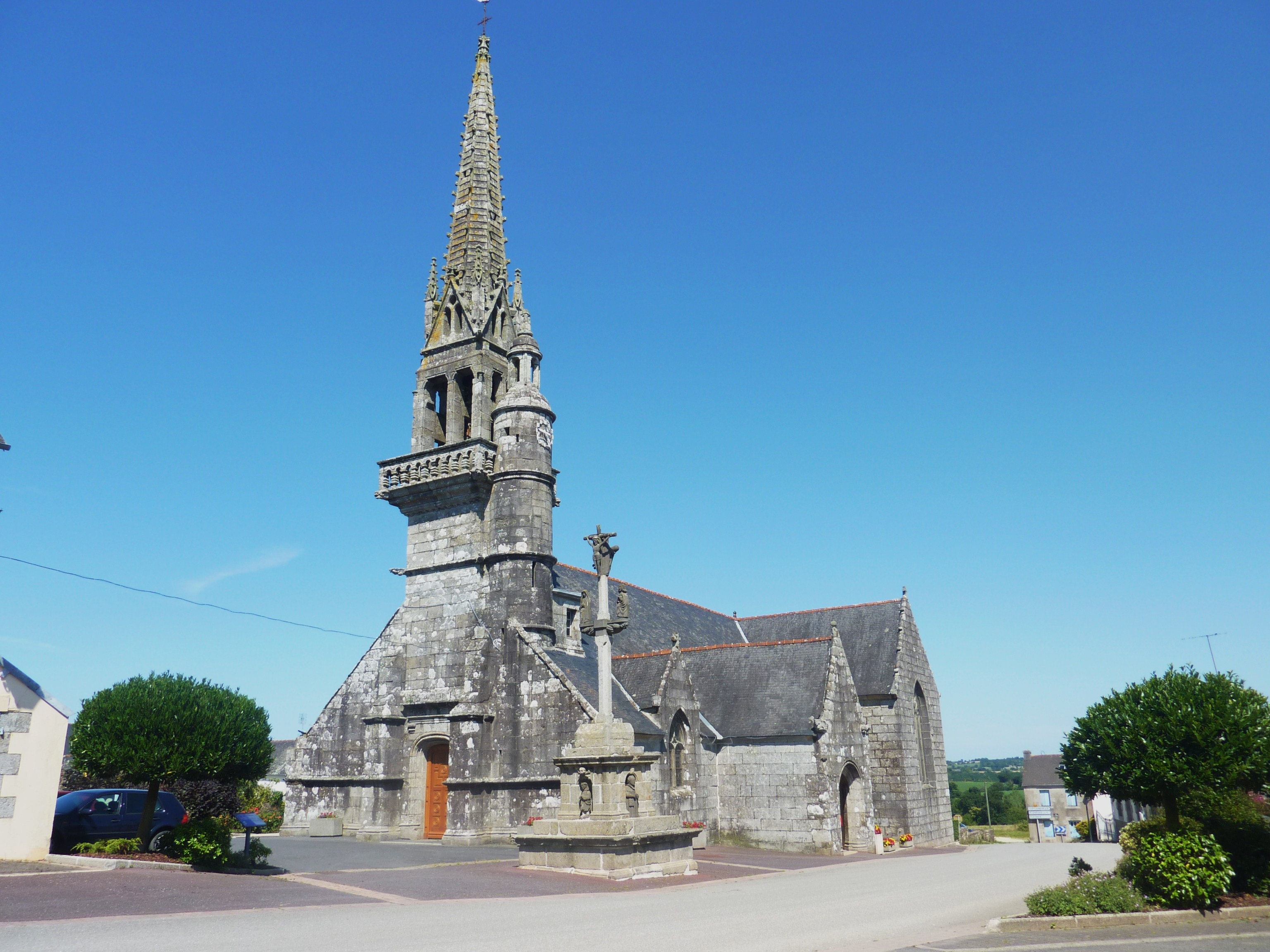 Le Cloître-Pleyben : l'église Saint-Blaise